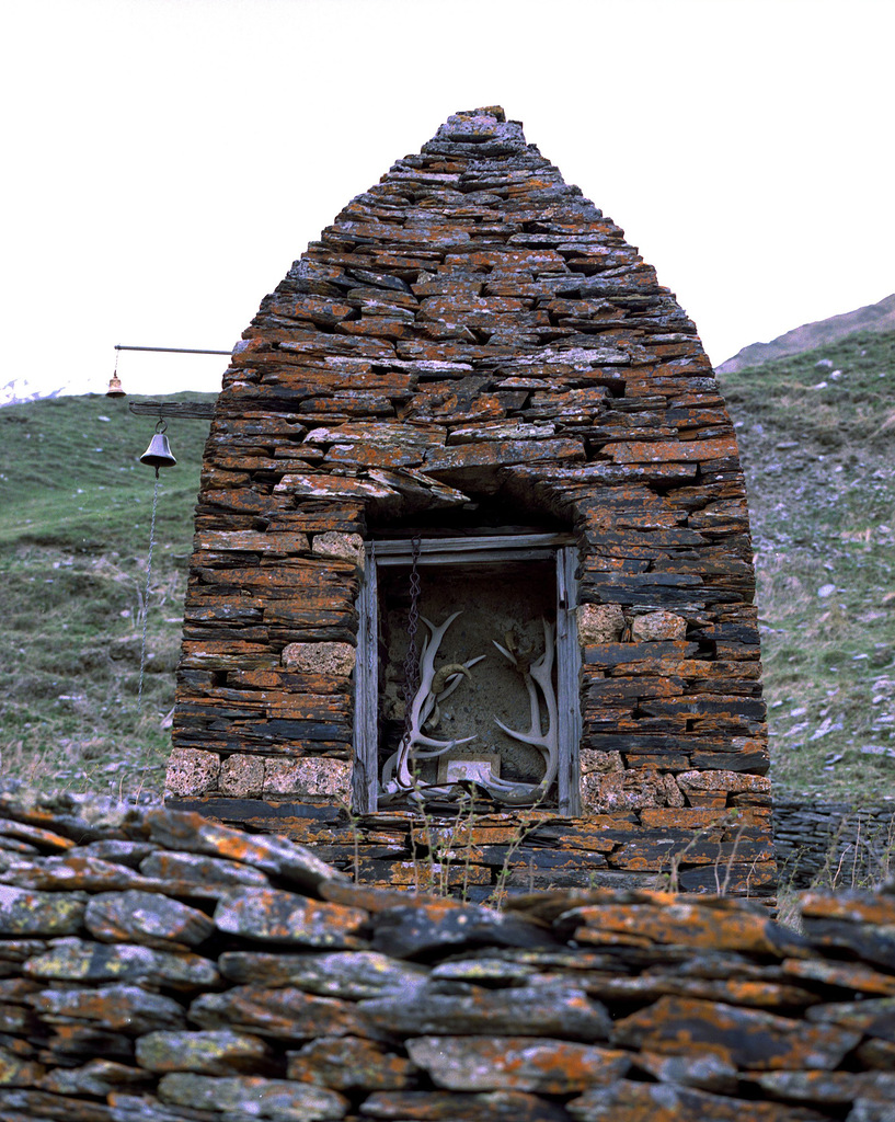 Святилище 'Хозы дзуар': над селением, на склоне горы лев. берега р. Льядон, Тапанкау, Алагирский район, Северная Осетия